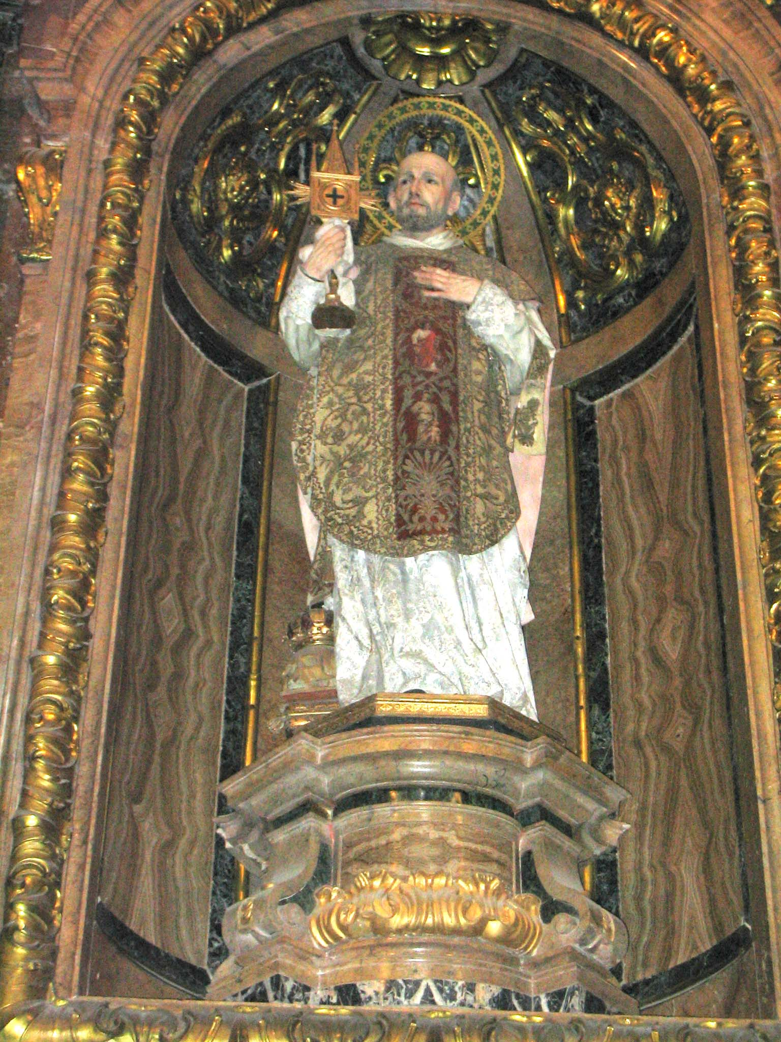 Detalle interior del Santuario de Loiola, Azpeitia. Guipúzcoa, País Vasco (España).